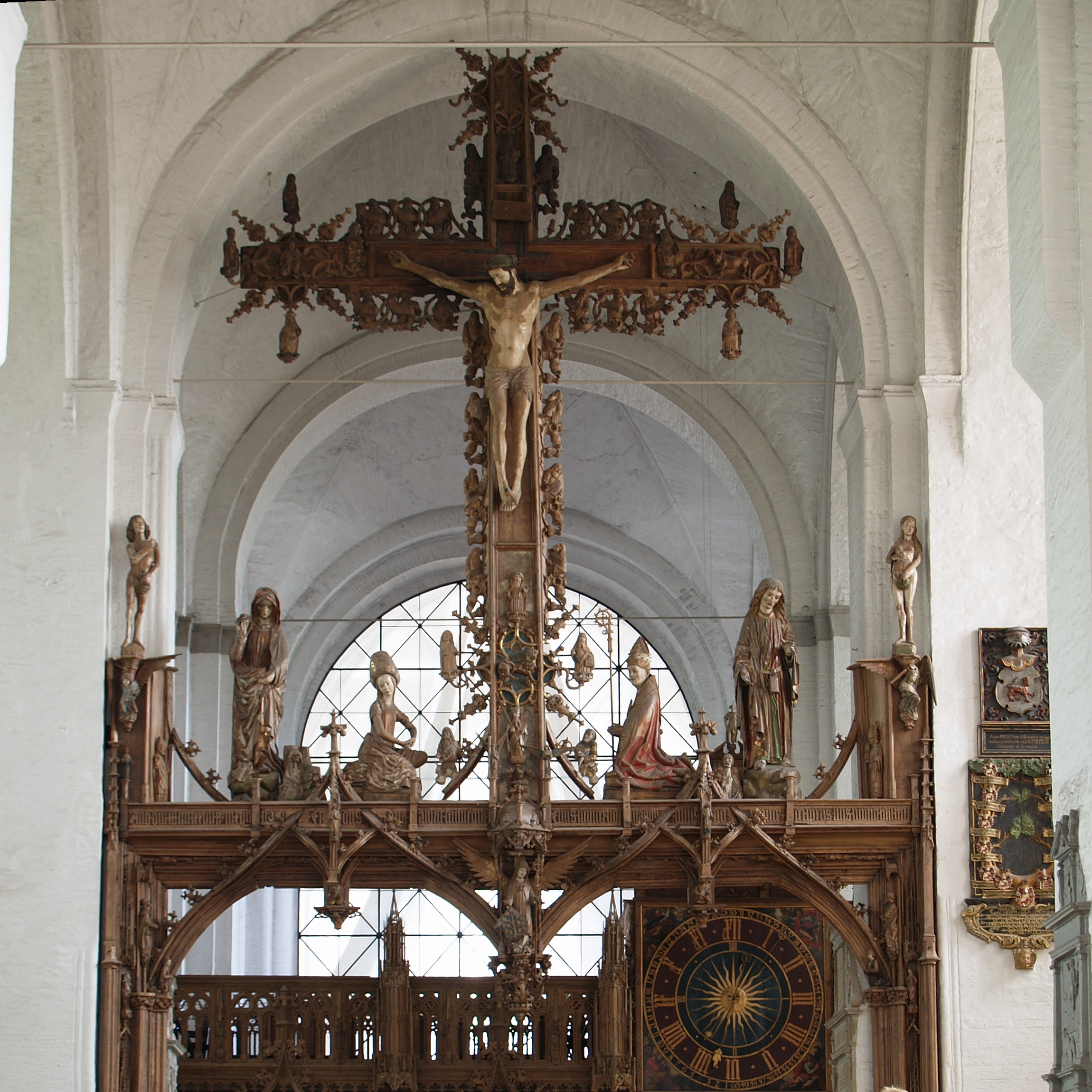 Triumphkreuz im Dom zu Lübeck